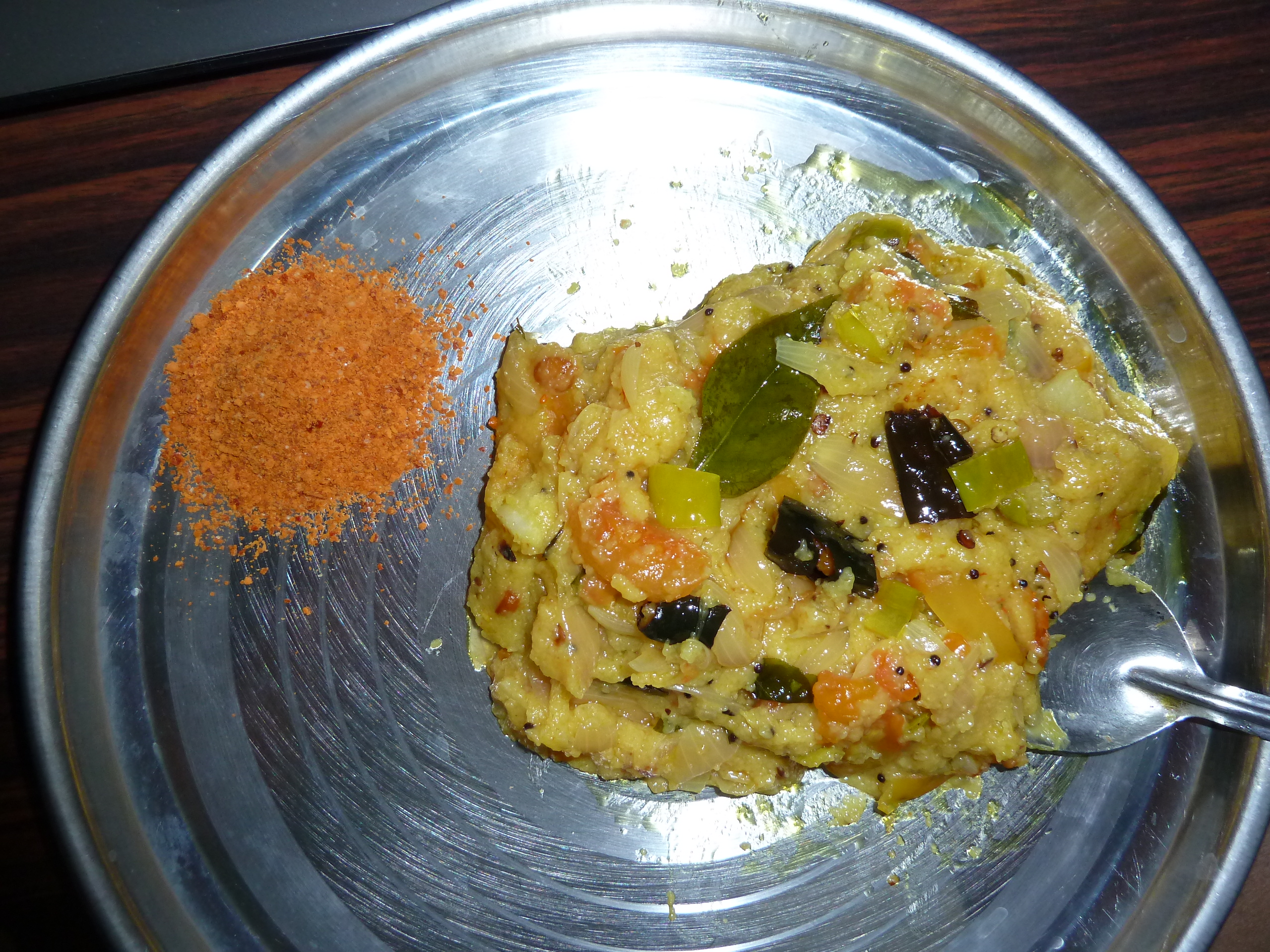 టమాట బాత్